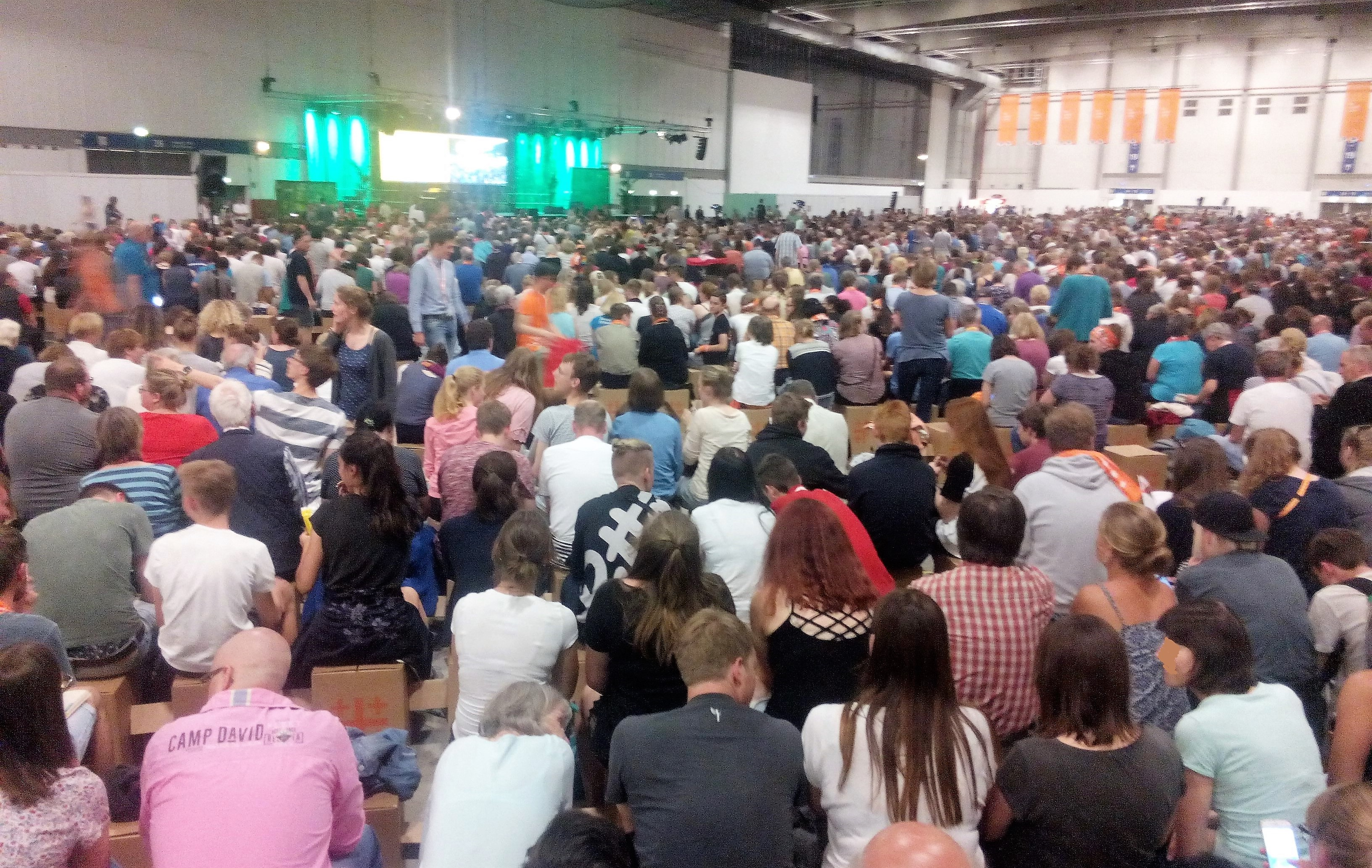 Großveranstaltung des Dt. Evang. Kirchentags Berlin "Wunder wirken Wunder" mit Dr. Eckart von Hirschhausen am 26.5.17 in der Messehalle 25